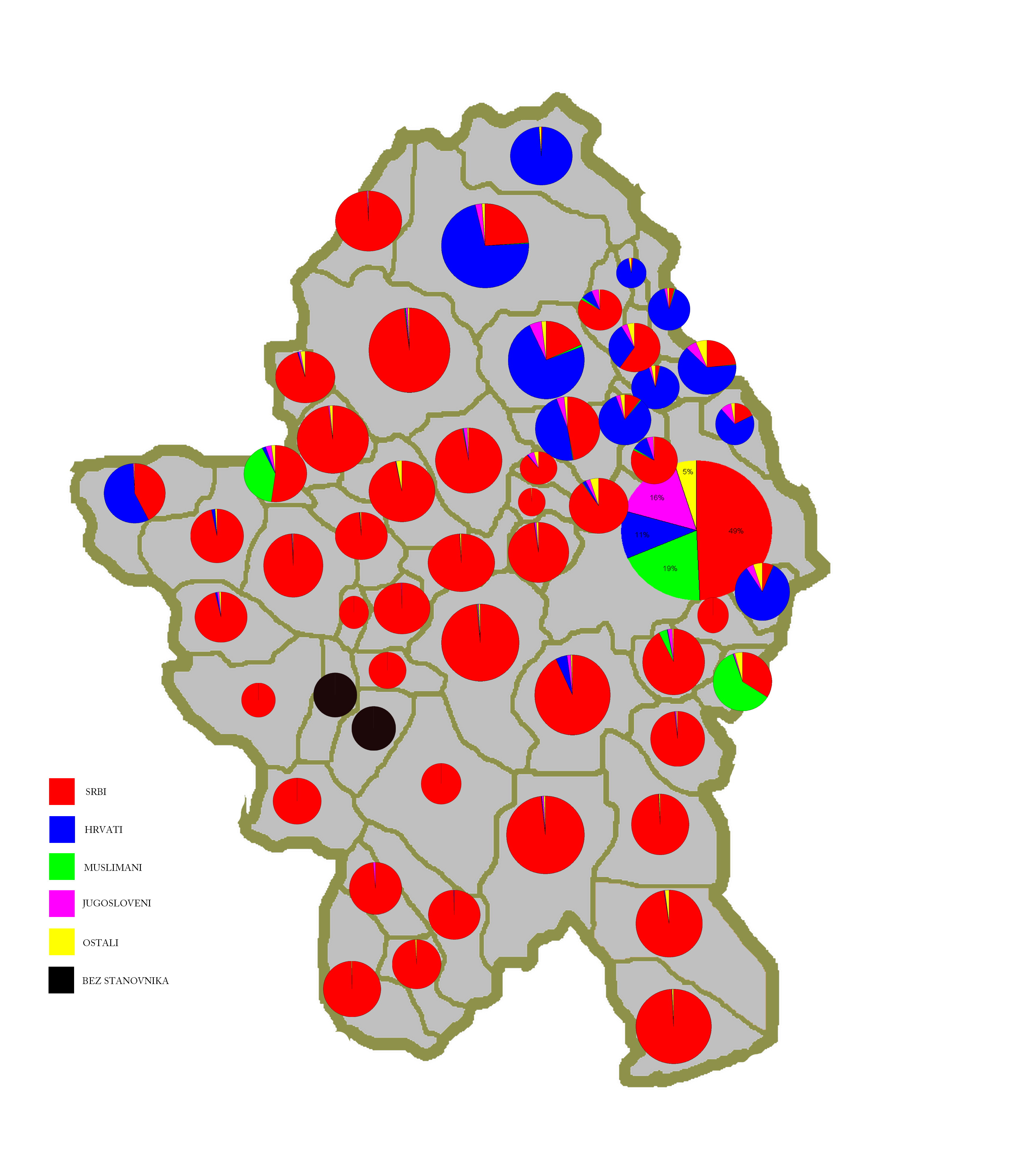 Етнички састав насељених мјеста Општине Бања Лука по попису 1991. године.